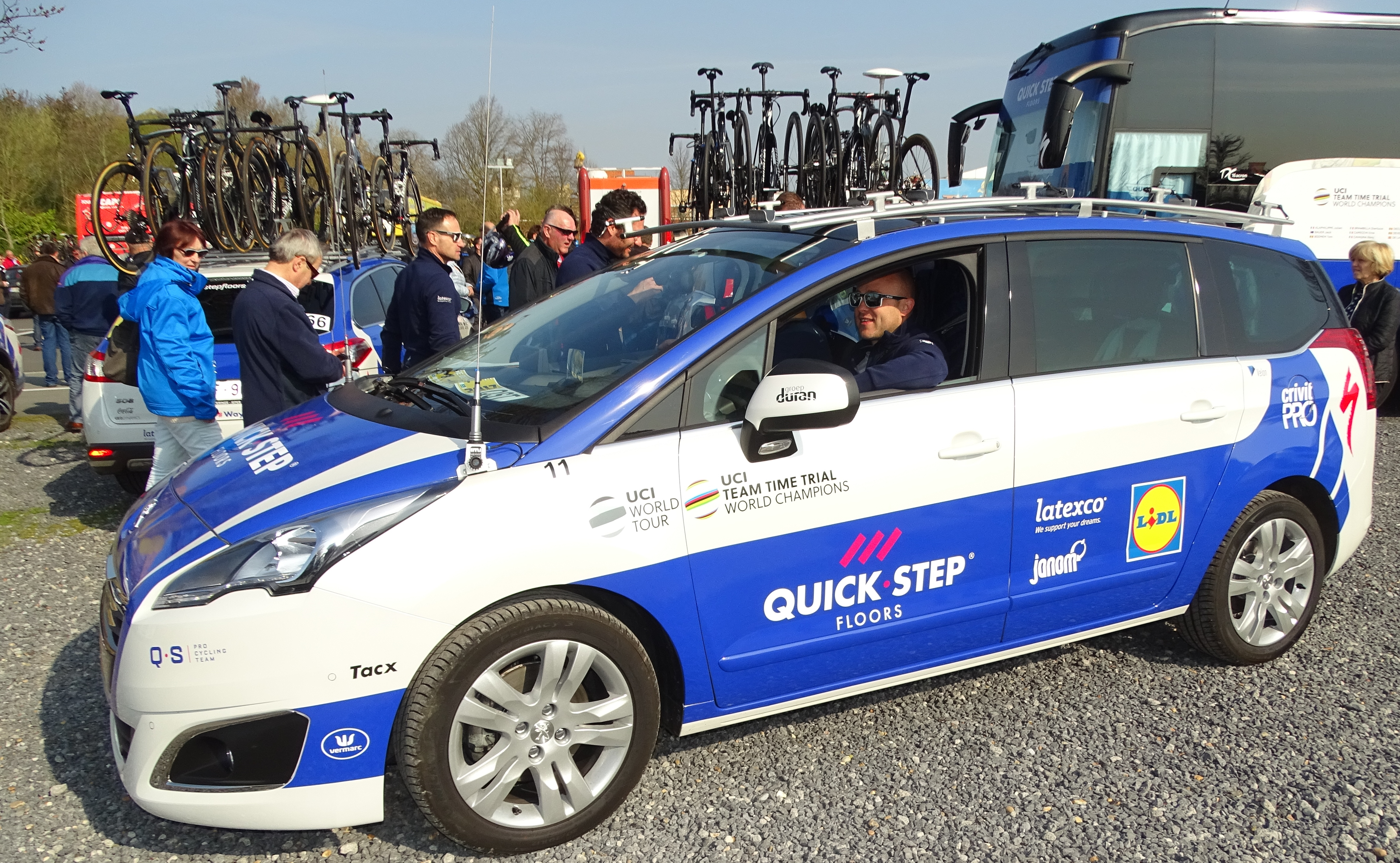 Reportage réalisé le mardi 28 mars à l'occasion de du départ de la première étape des Trois jours de La Panne 2017 à Adinkerque (La Panne), Belgique.